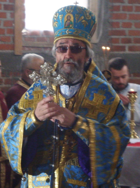 Епископ Јефрем